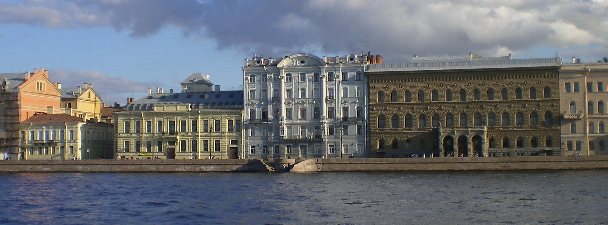 Дворцовая набережная, дома № 20-26, Мошков переулок, вид с Невы.